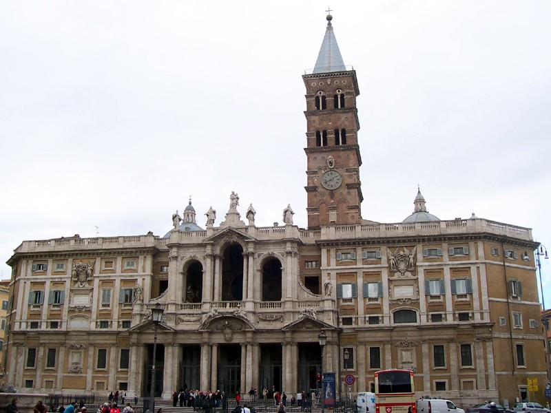 Roma - Basilica di S. Maria Maggiore